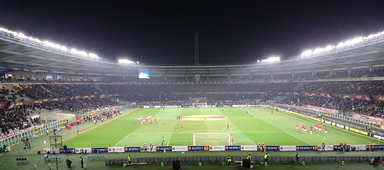 Stadio Olimpico di Torino (visto dalla Curva Primavera)